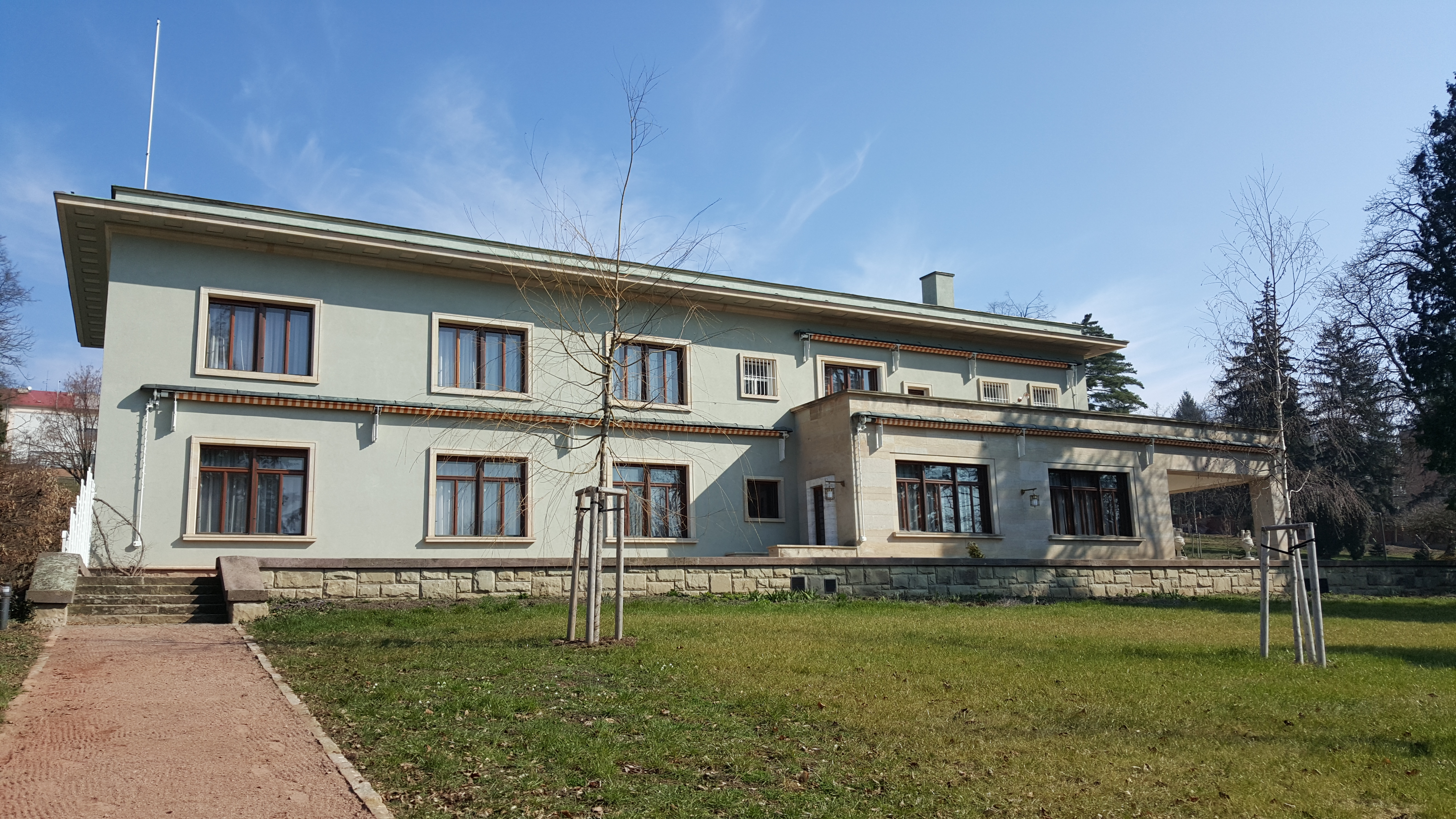 Vila Stiassni - Ernst Wiesner (1927–1929) Brno, Hroznová 14